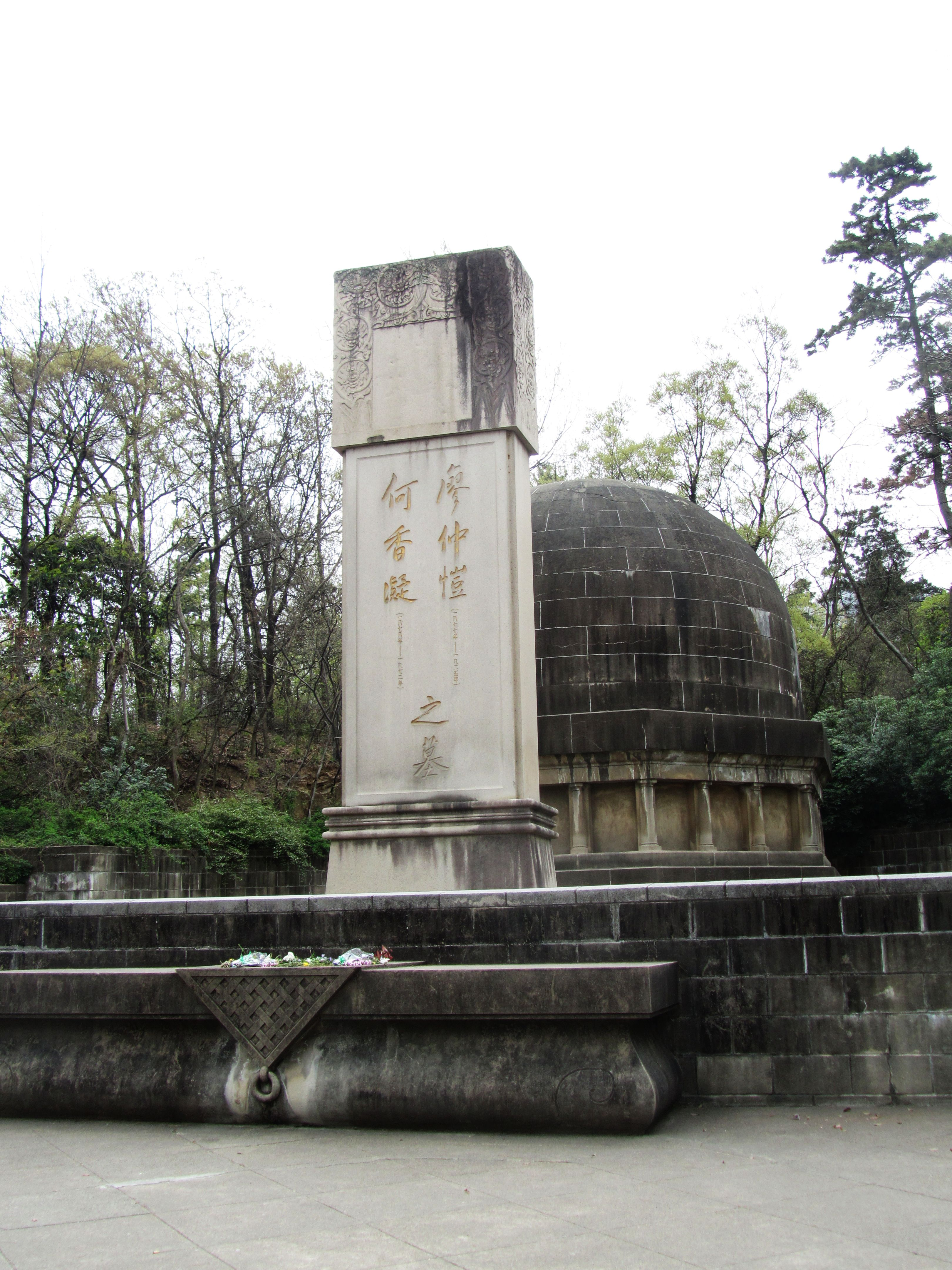 钟山风景区廖仲恺何香凝墓-墓碑。